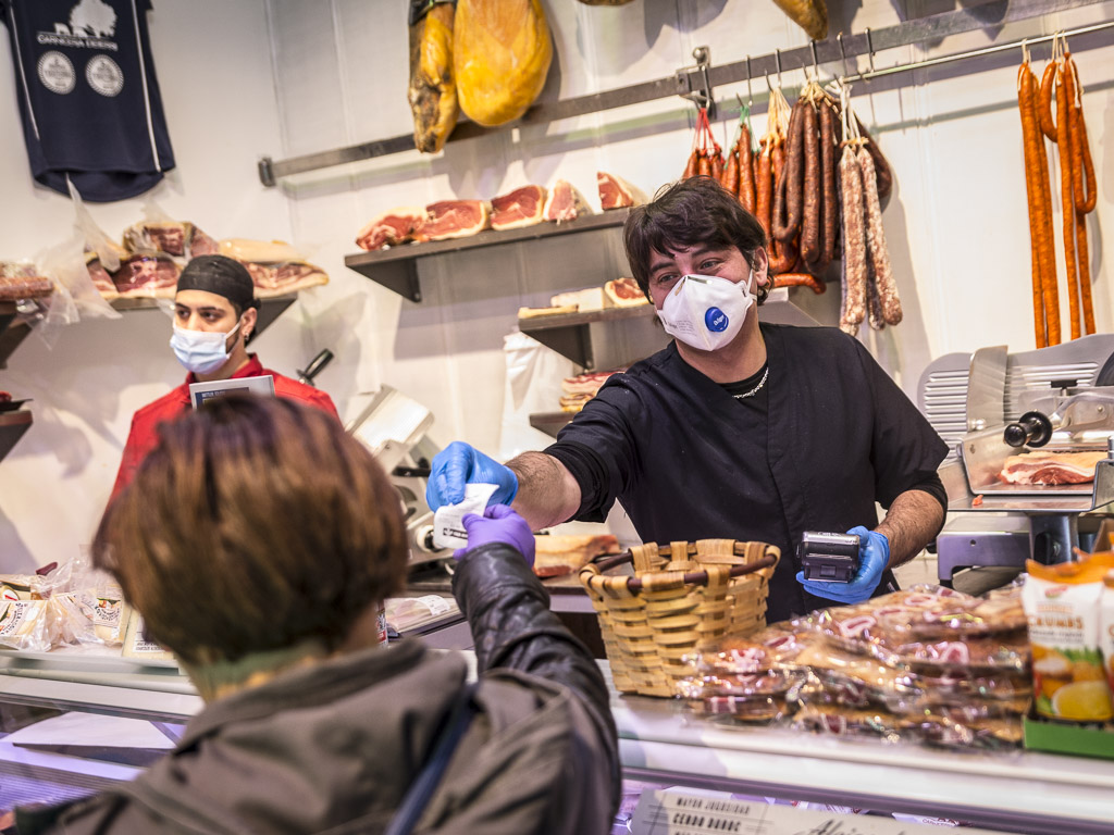 Iruñeko komertzioa COVID-19 pandemian. Irudi guztiak hemen